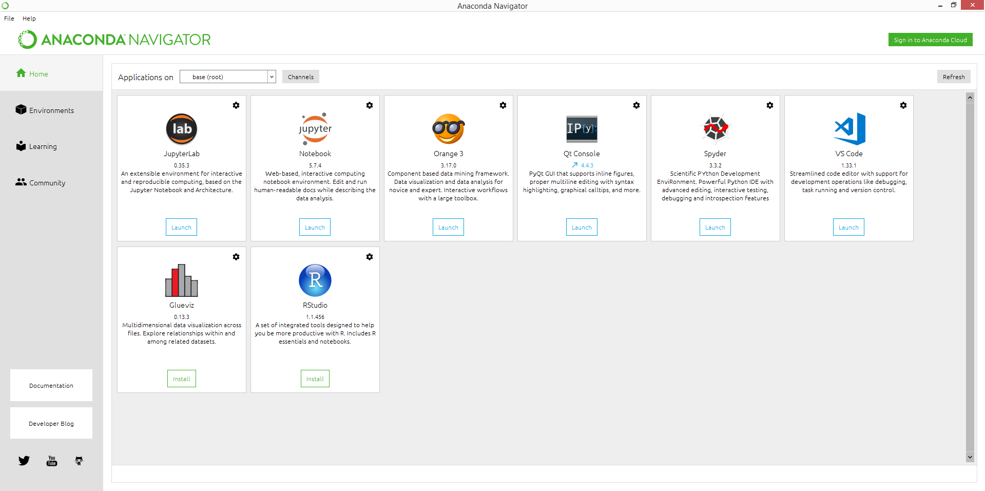 Главное поле программы